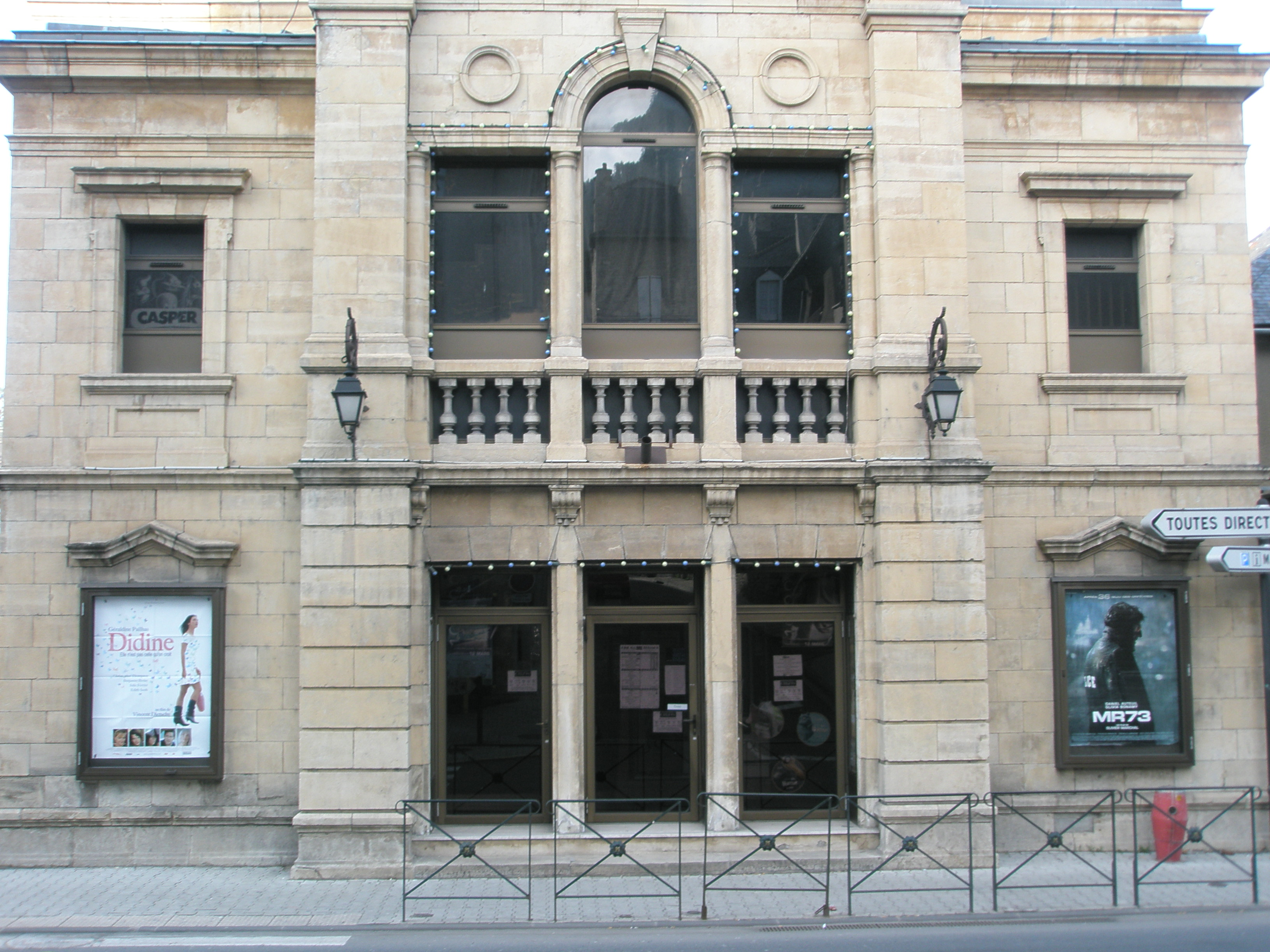 Matériel publicitaire du cinéma de Mende (France)Cinema's publicity in France